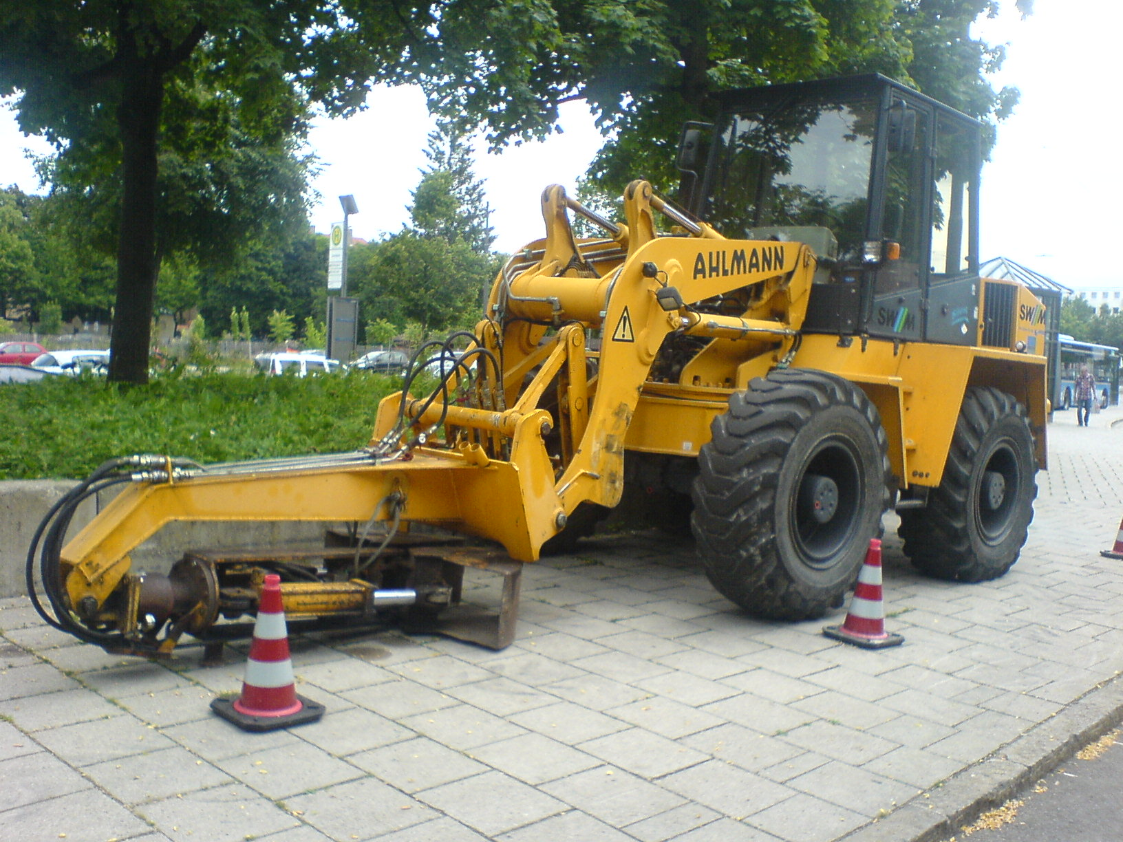 Schwenklader Ahlmann AS 14 mit Anbaugerät (München).